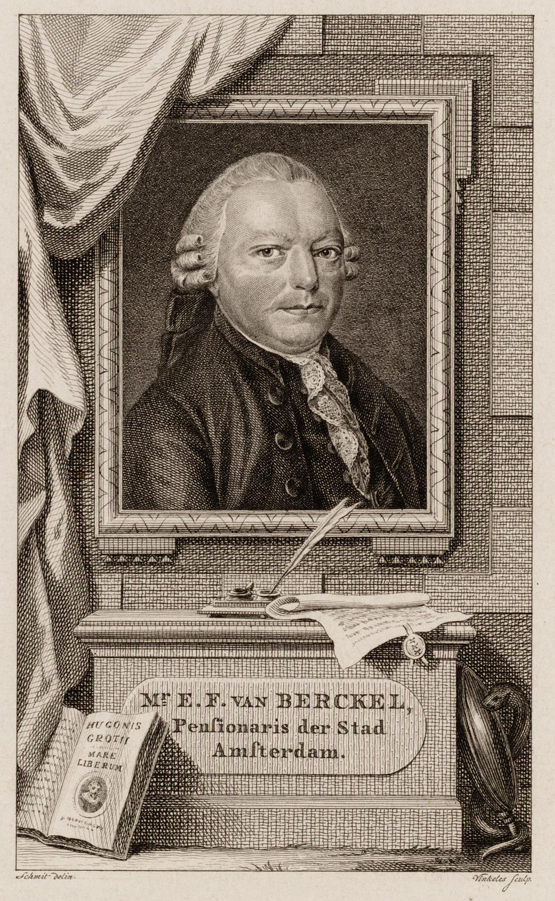 Beschrijving Engelbert Francois van Berckel (1726-1796) Pensionaris van Amsterdam. Afmetingen: 143x86 mm. Documenttype prent Vervaardiger Schmit, ... (tekenaar) Vinkeles, R. (Reinier ; 1741-1816) Collectie Collectie Stadsarchief Amsterdam: tekeningen en prenten Datering 1746 t/m 1816 Inventarissen Afbeeldingsbestand 010097008094